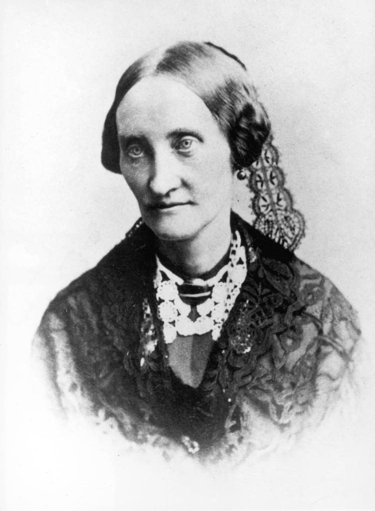 Pauline Worm portrait